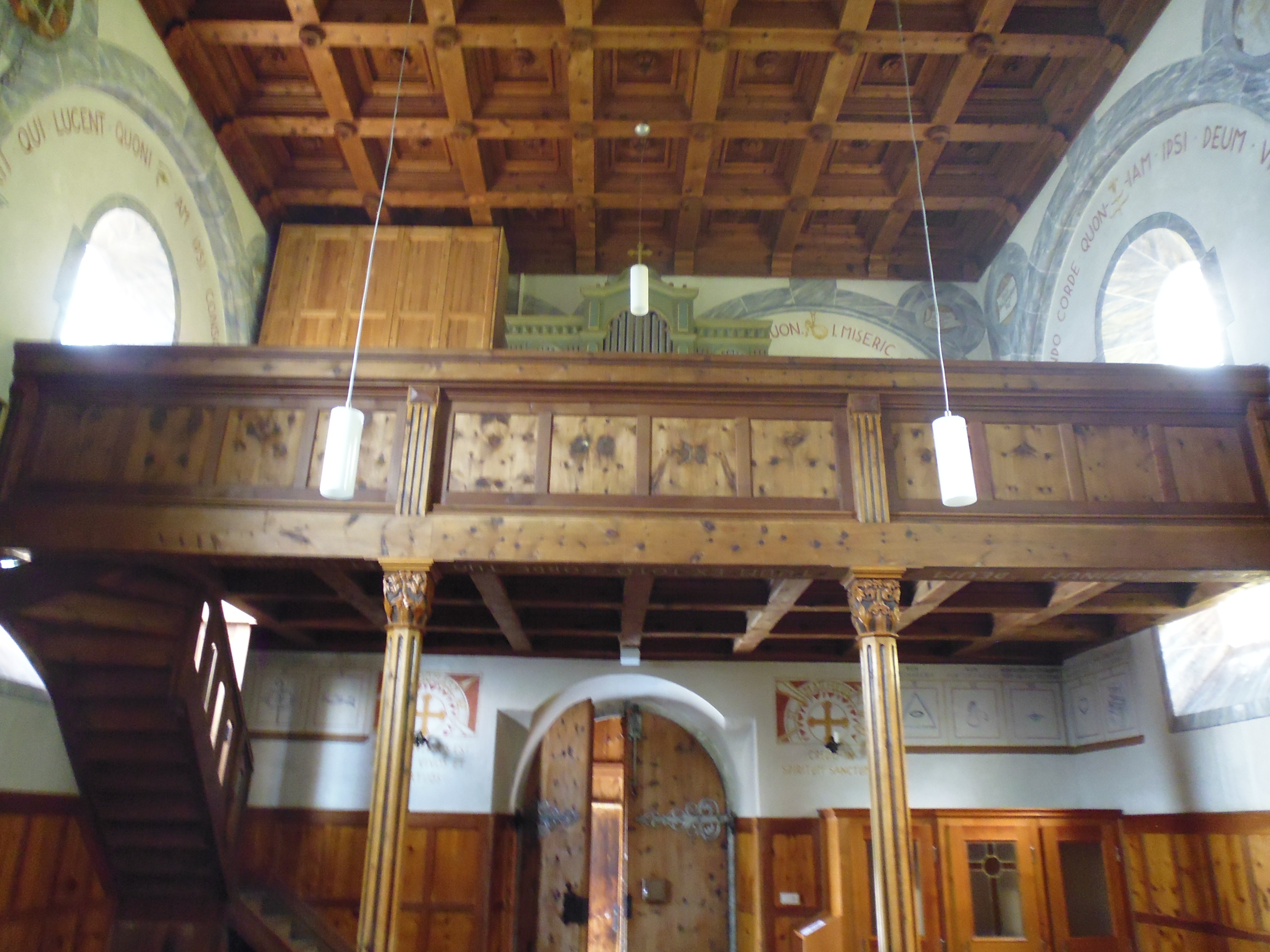 Herz-Jesu Kirche in der Fraktion Tanas von Laas (Südtirol)